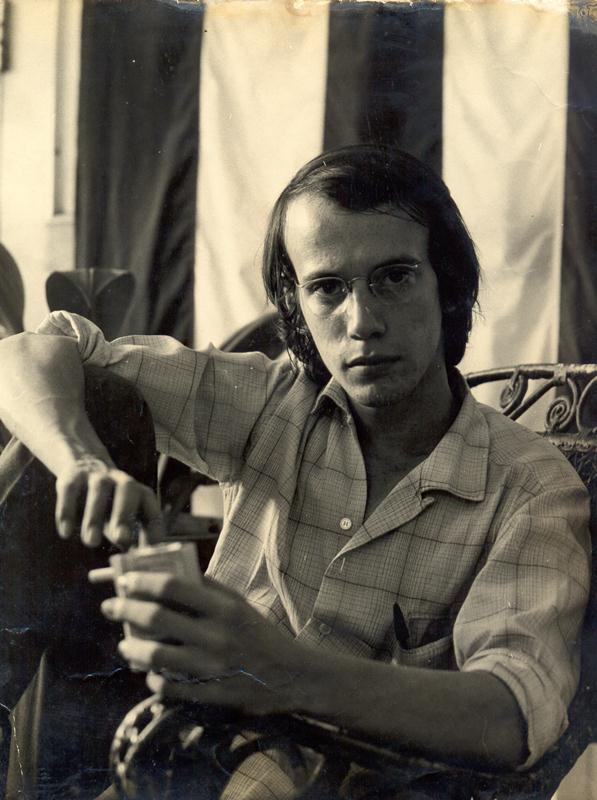 Silvio Rodríguez en 1969. Fotografía tomada por Mario García Joya, proporcionada con el permiso de Silvio Rodríguez, desde su sitio web personal